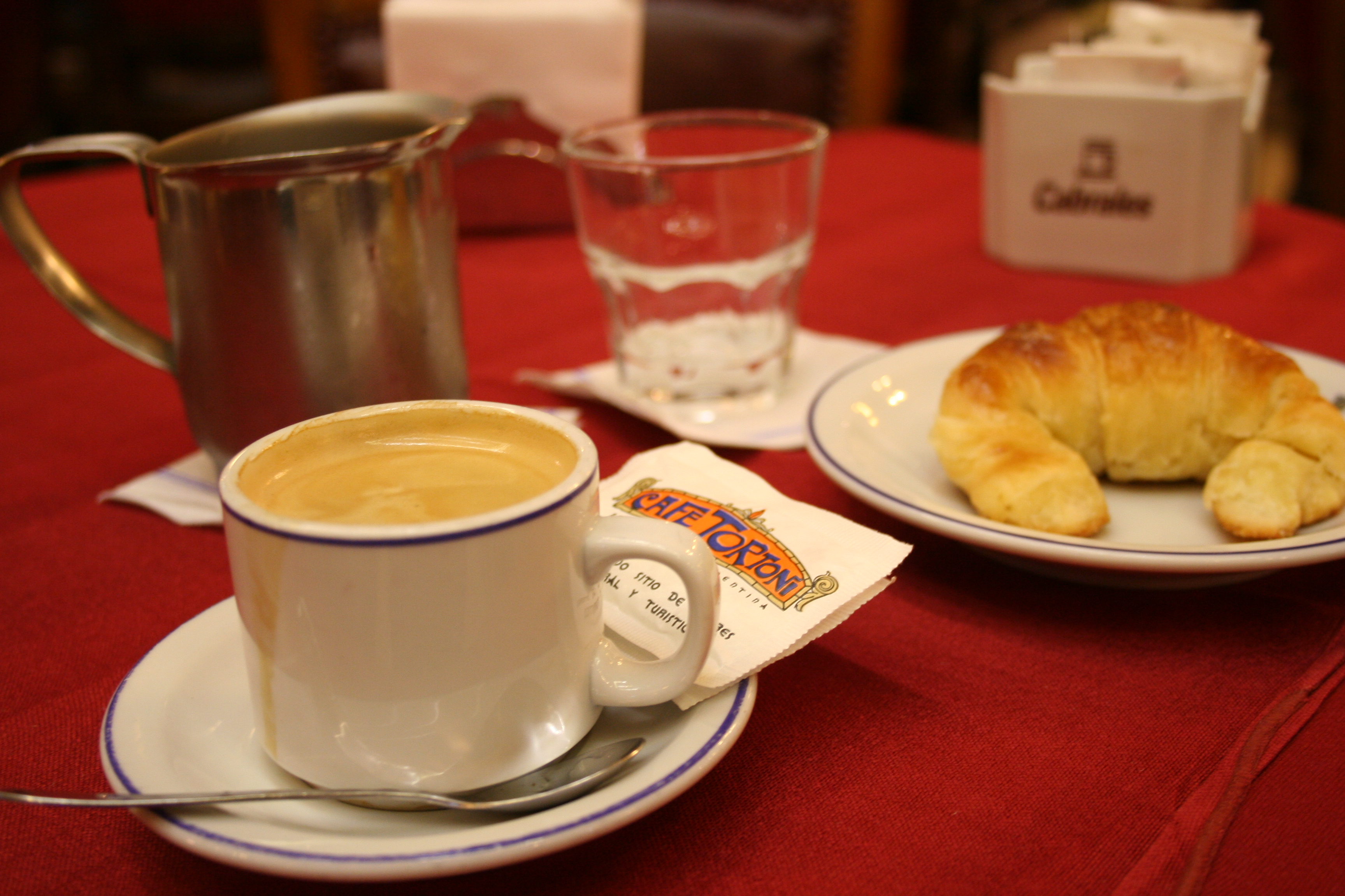 Un café cortado y un croissant, en Buenos Aires.